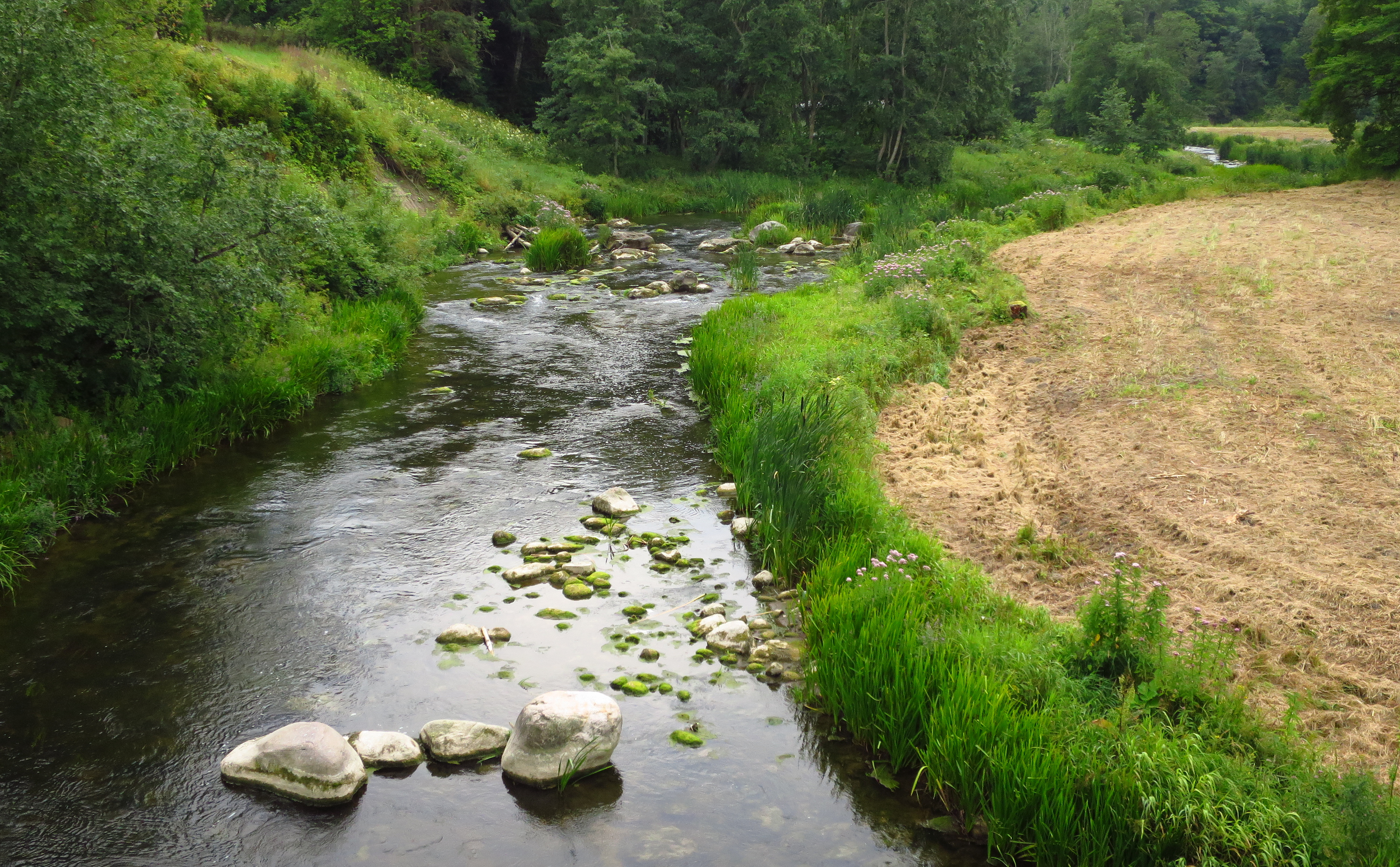 Selja jõgi Selja jõe maastikukaitsealal